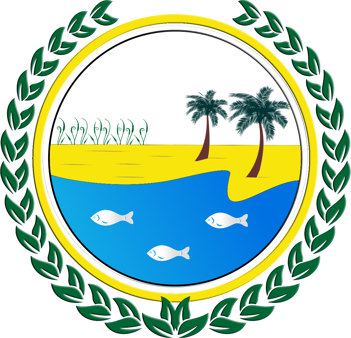 Brasão Oficial de Piçabuçu